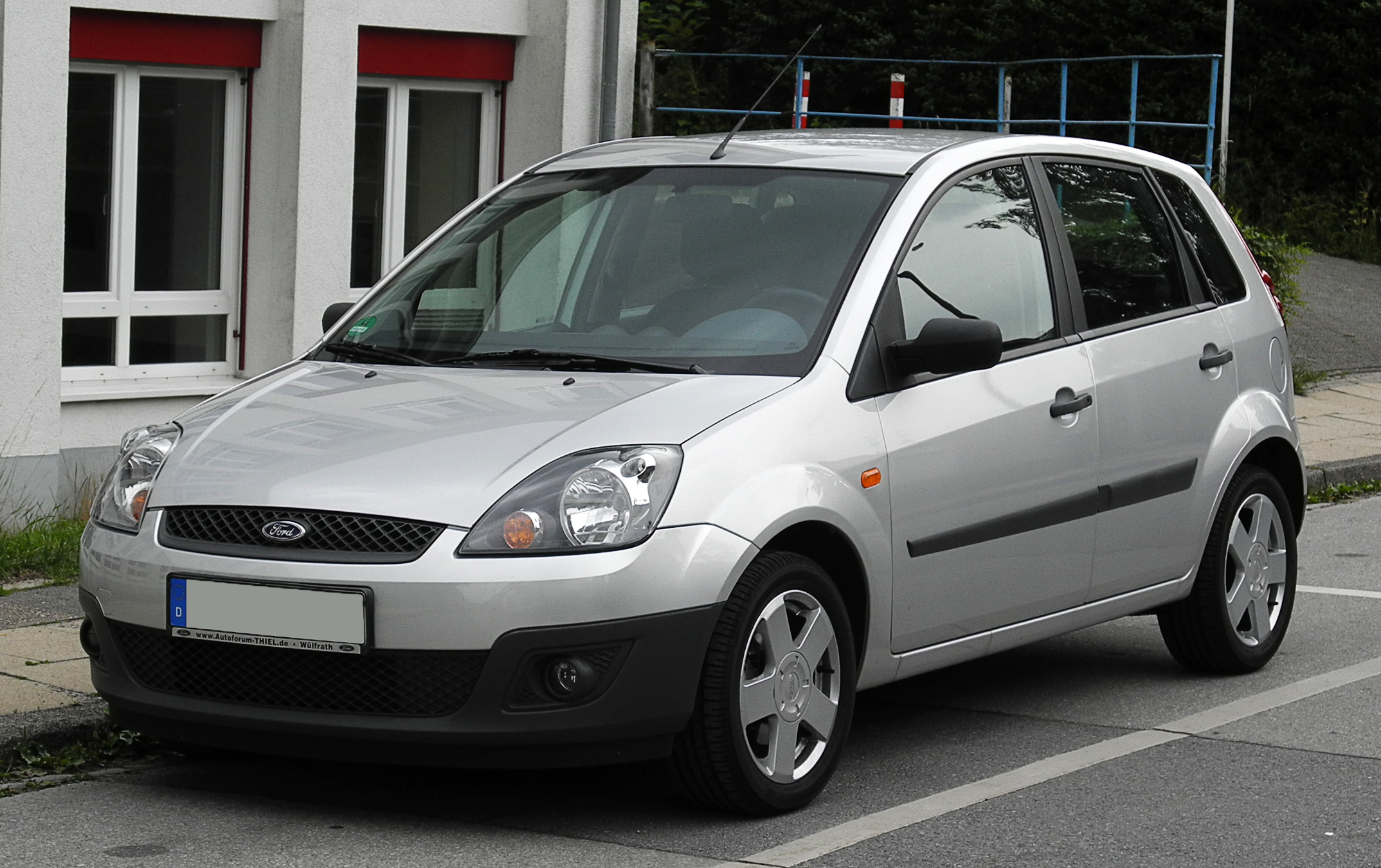 Ford Fiesta (VI, Facelift)